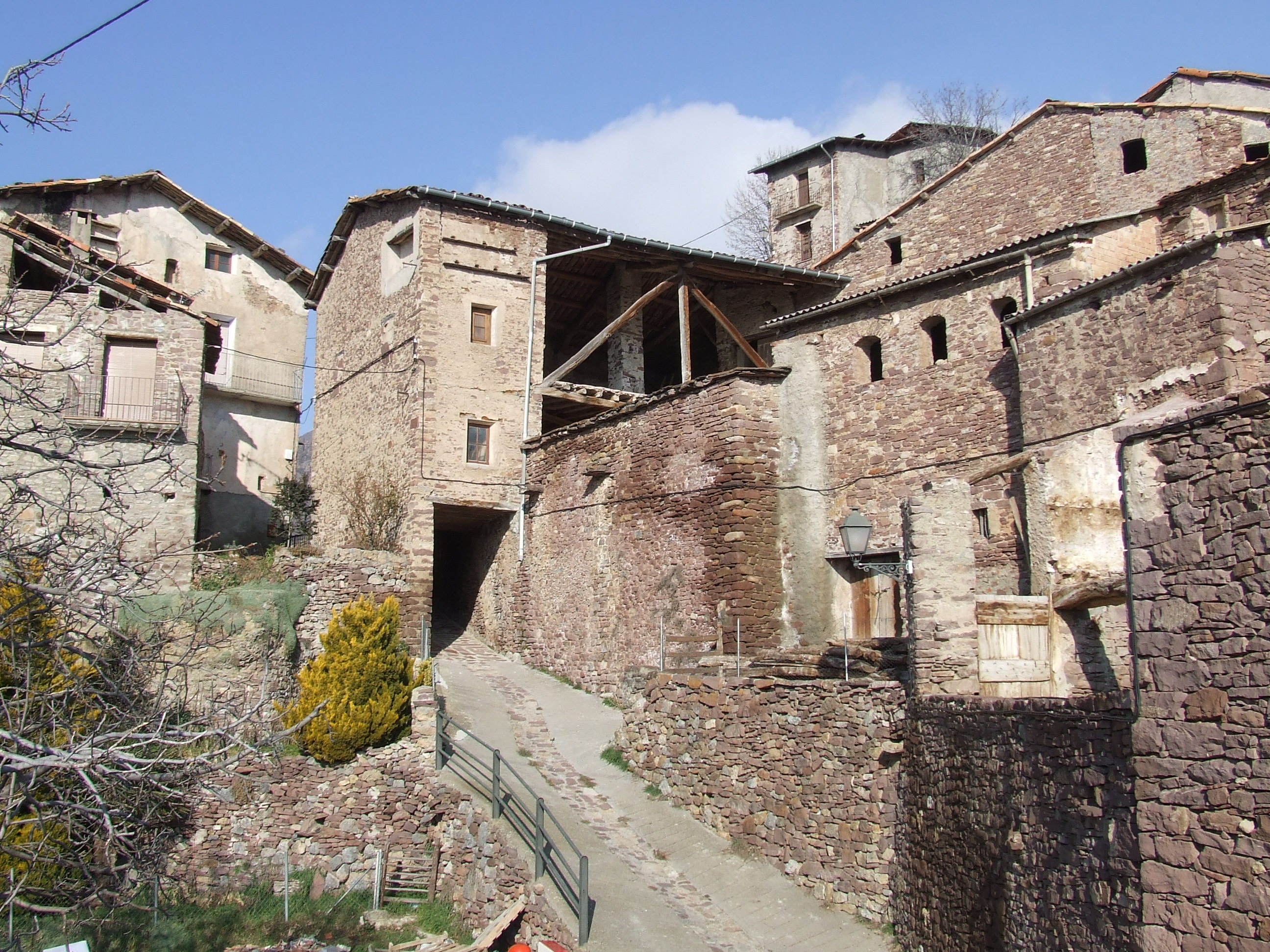 Castell-estaó (la Pobleta de Bellveí, la Torre de Cabdella, Pallars Jussà)